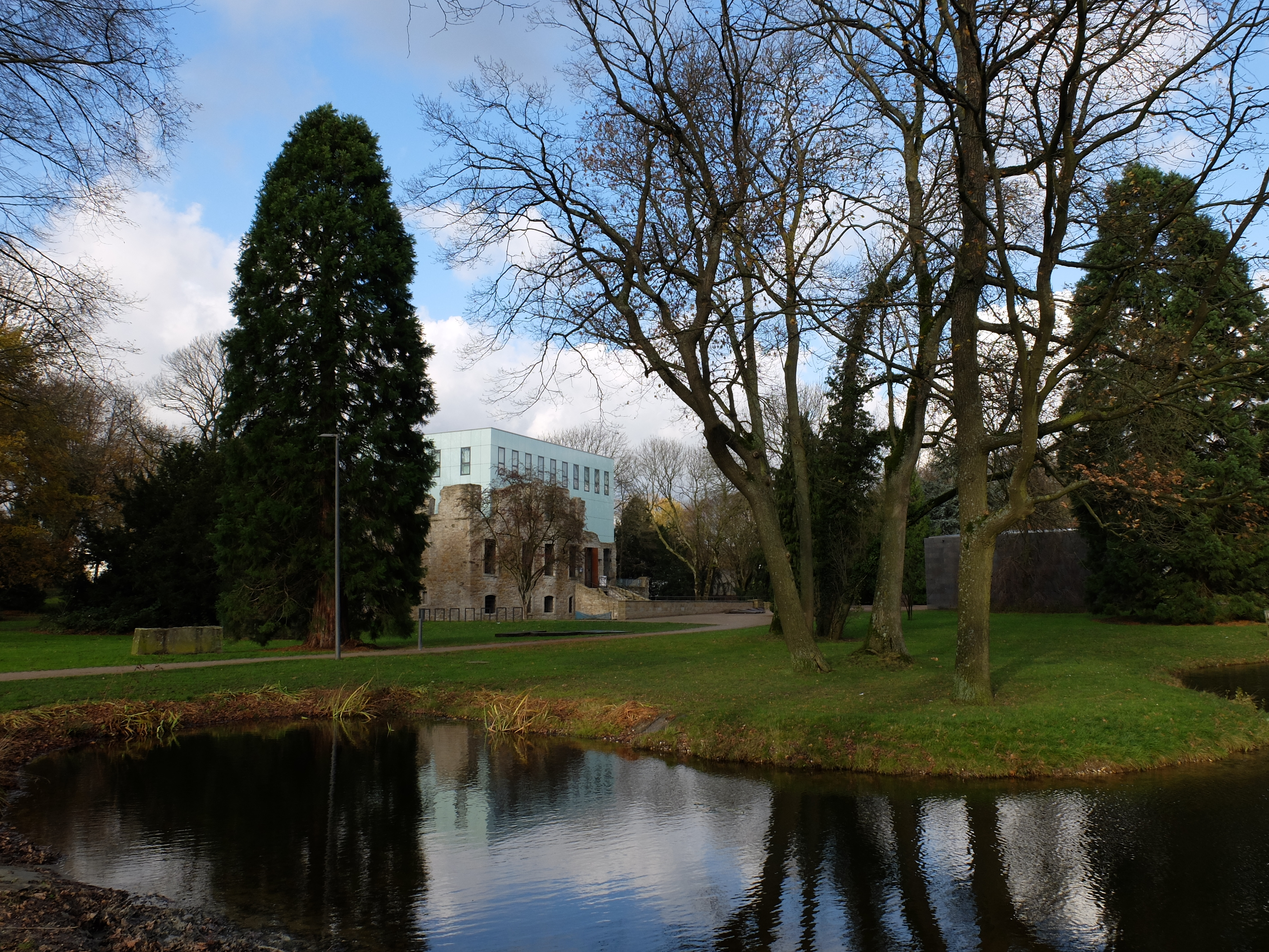 Situation Kunst - Teil der Kunstsammlungen der Ruhr-Universität